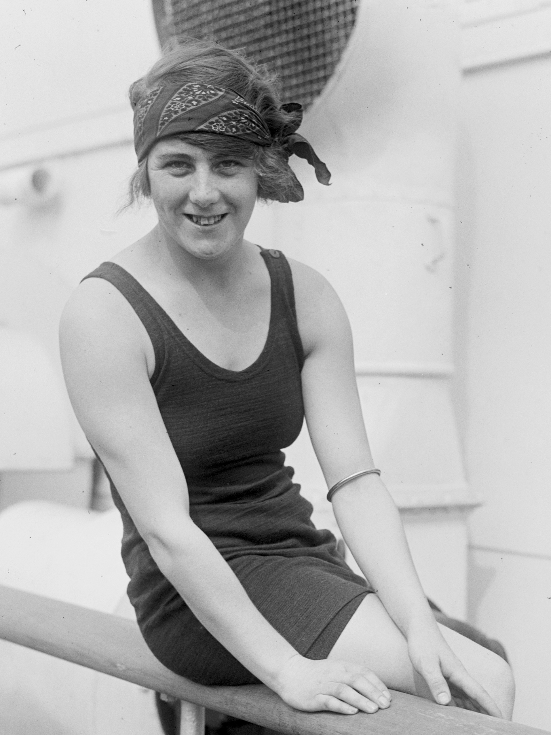 Hilda James